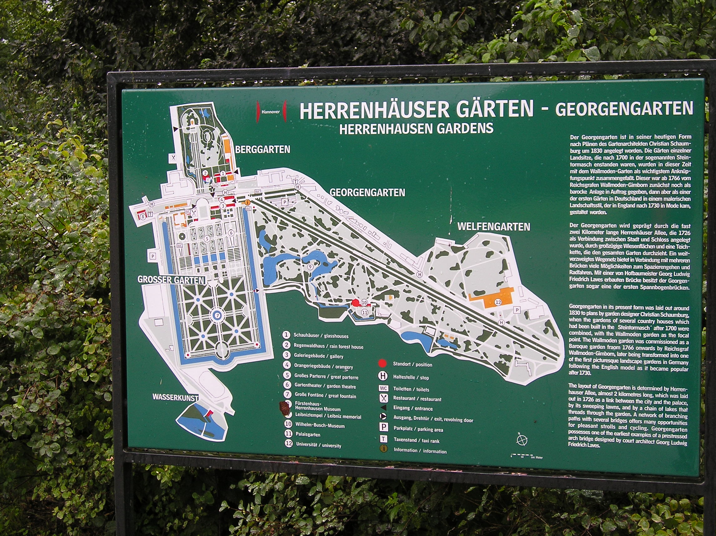 Overview Herrenhäuser Gärten Author User:Andro96, taken on 26.07.2004